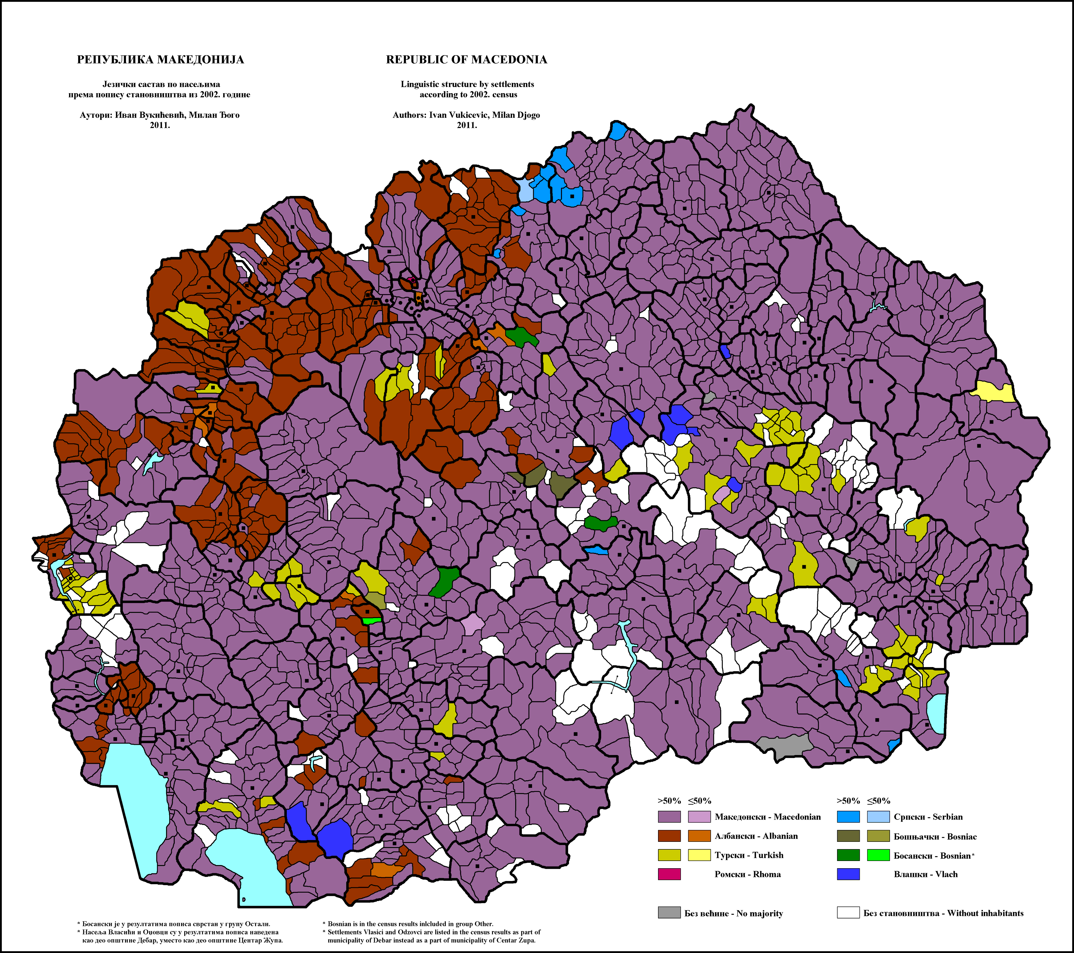 Језички састав Македоније по насељима 2002. године. Аутори: Иван Вукићевић - , Милан Ђого